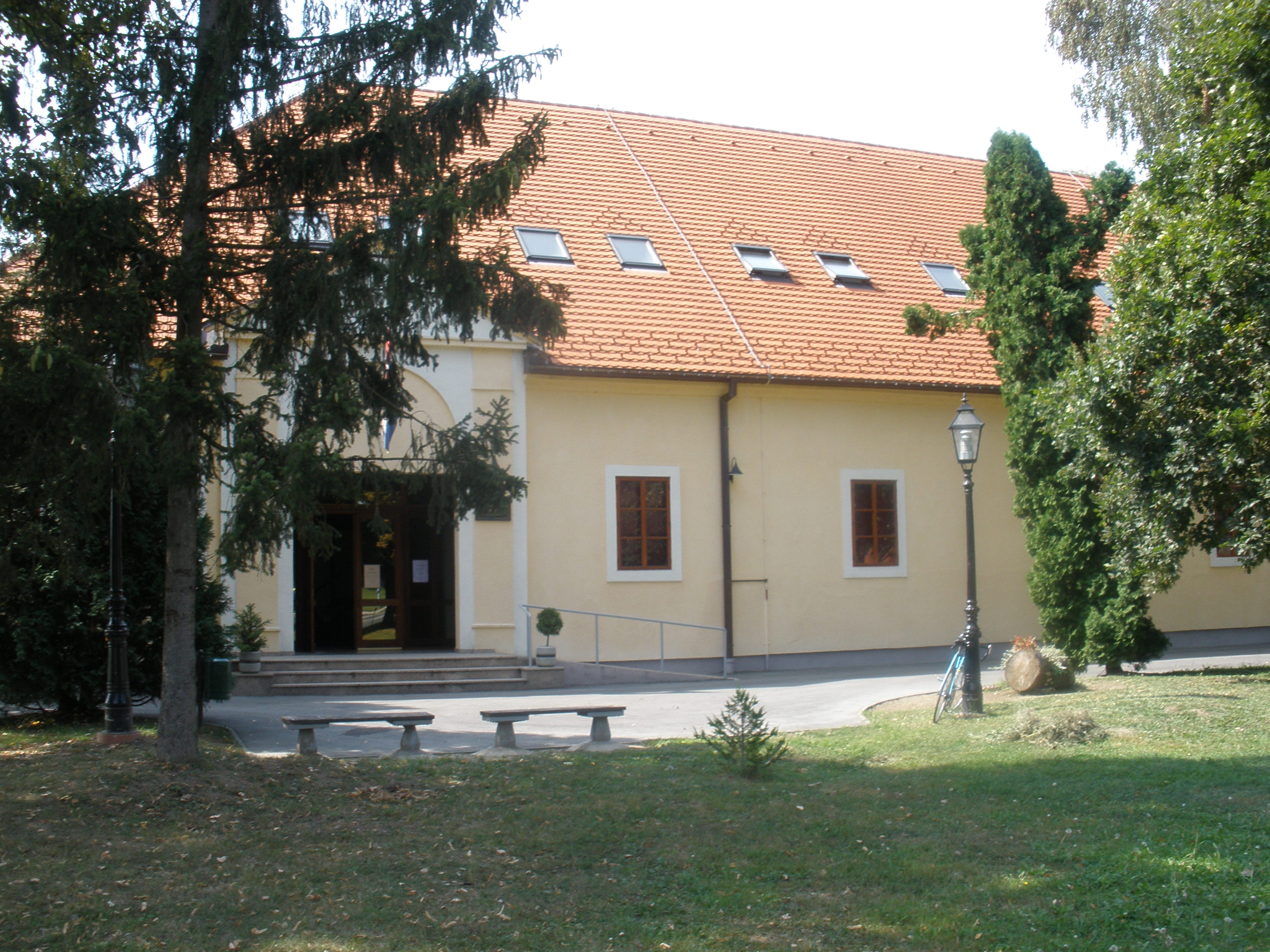 Osnovna glazbena škola "Ivan Zajc" u Slavonskome Brodu.